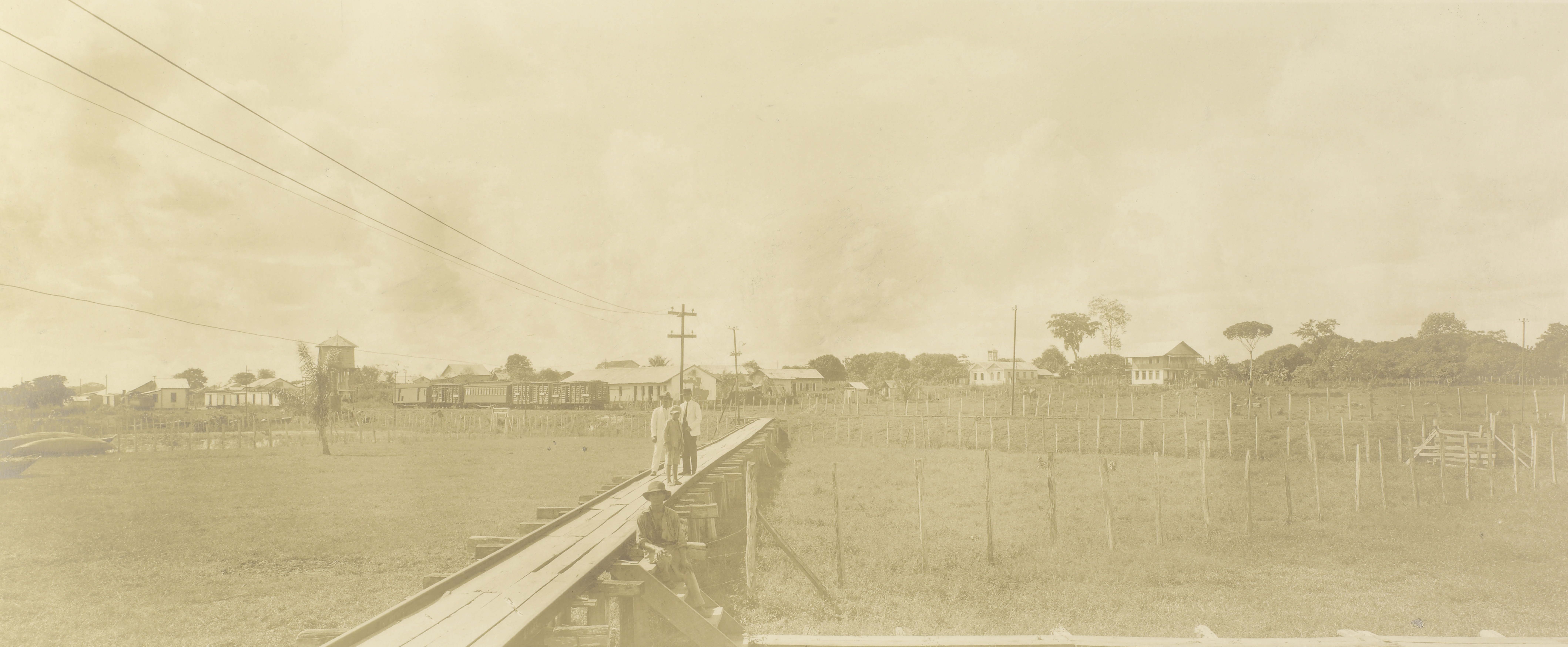 Imagem do Fundo Ministério da Guerra, do Arquivo Nacional